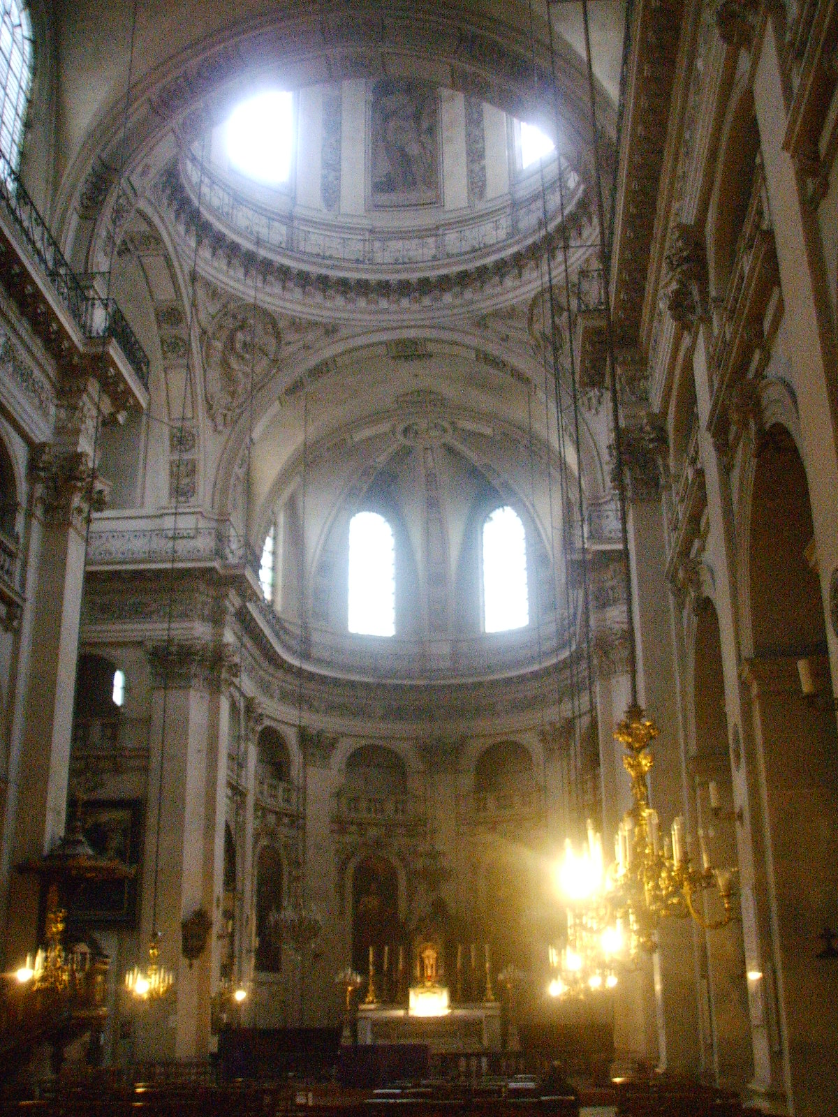 Église Saint-Paul-Saint-Louis